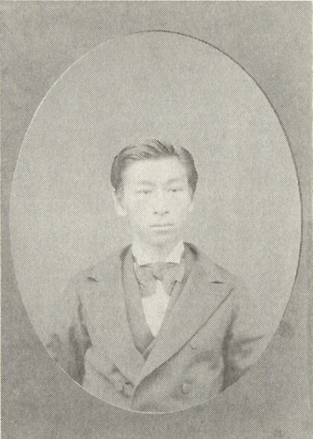 山本実庸の肖像写真。